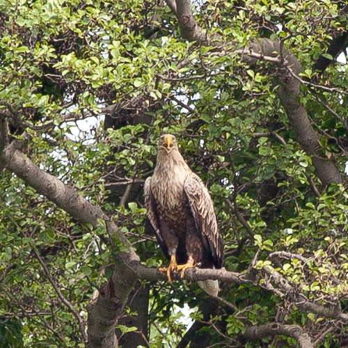 Seeadler auf Kaninchenwerder 2012